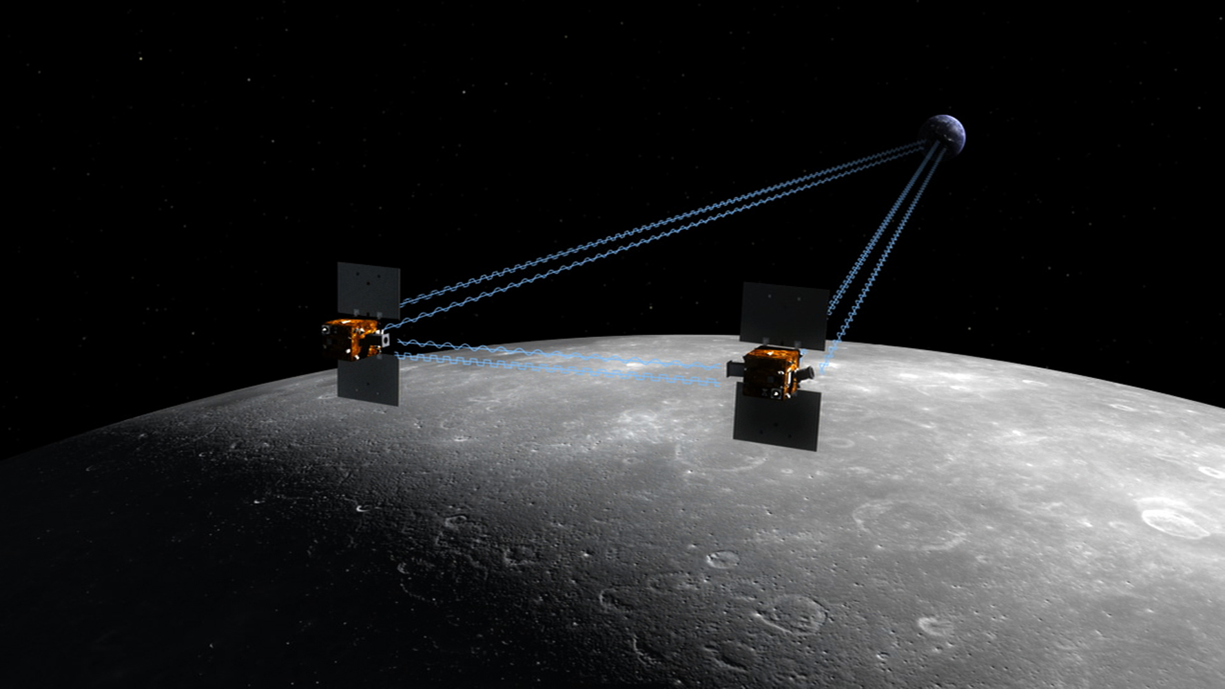 GRAIL lunar probes